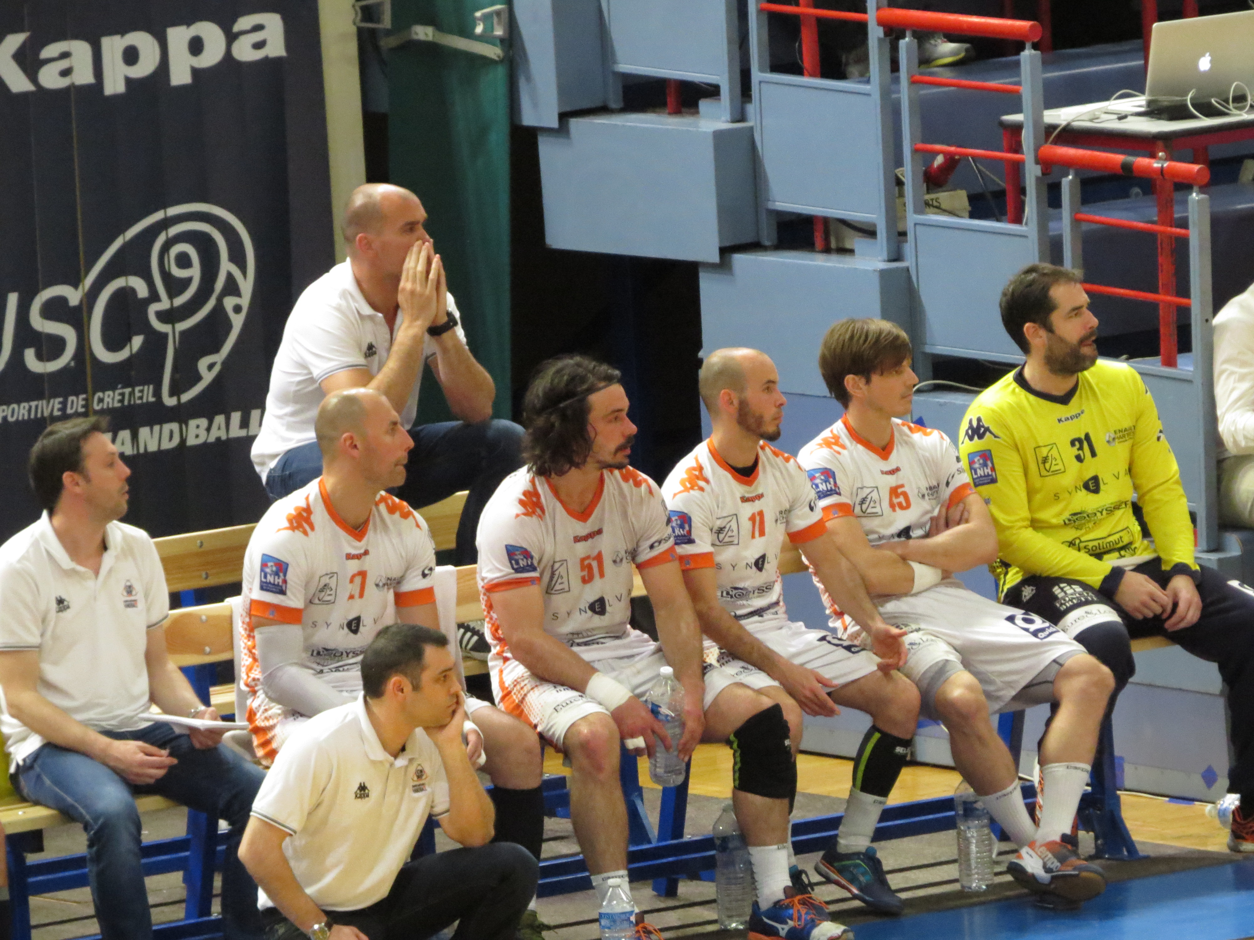 Match du championnat de France de Hand entre Créteil et Chartres Victoire de Créteil 39 - 35